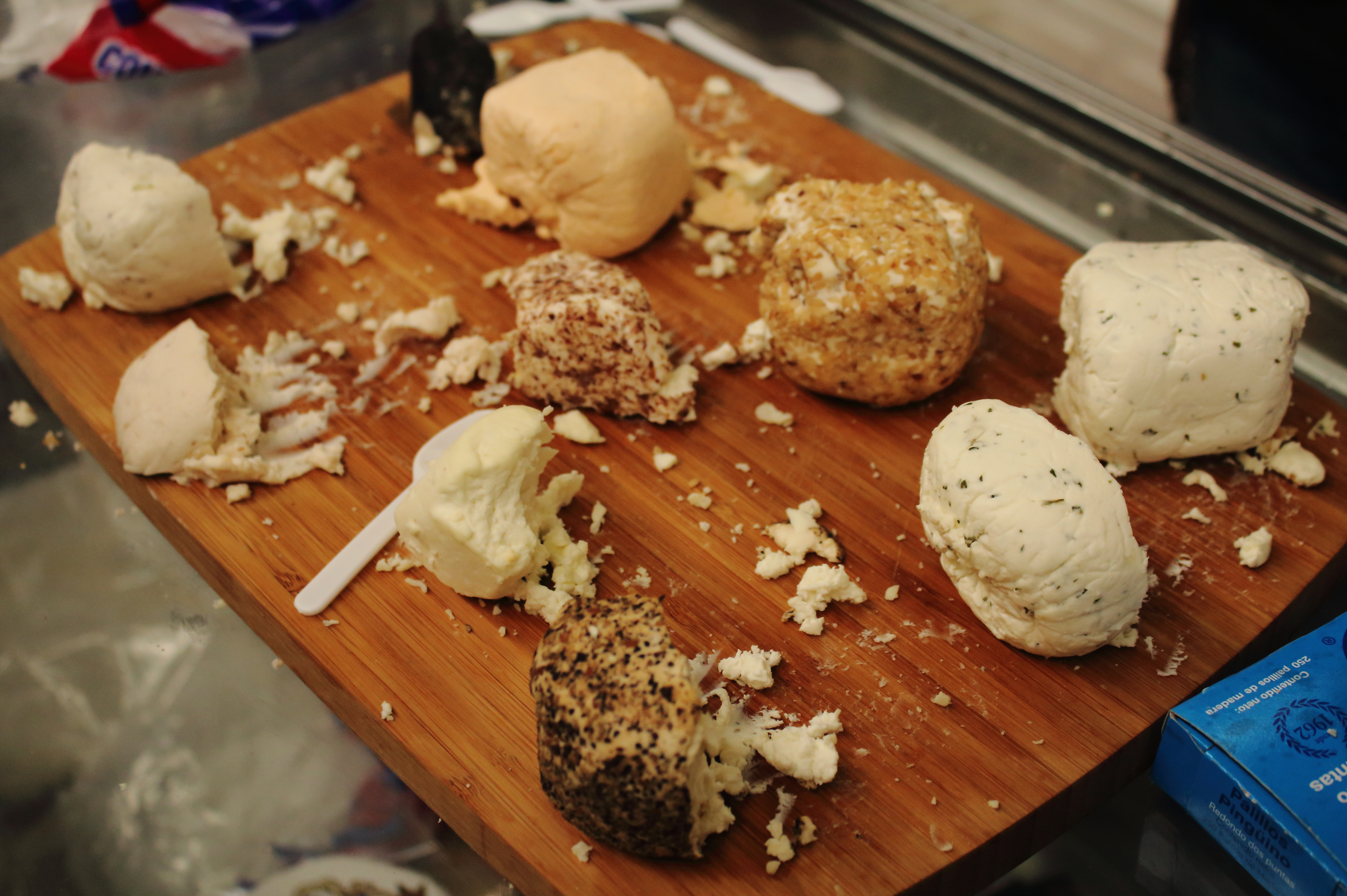 Variedad de quesos queretanos.